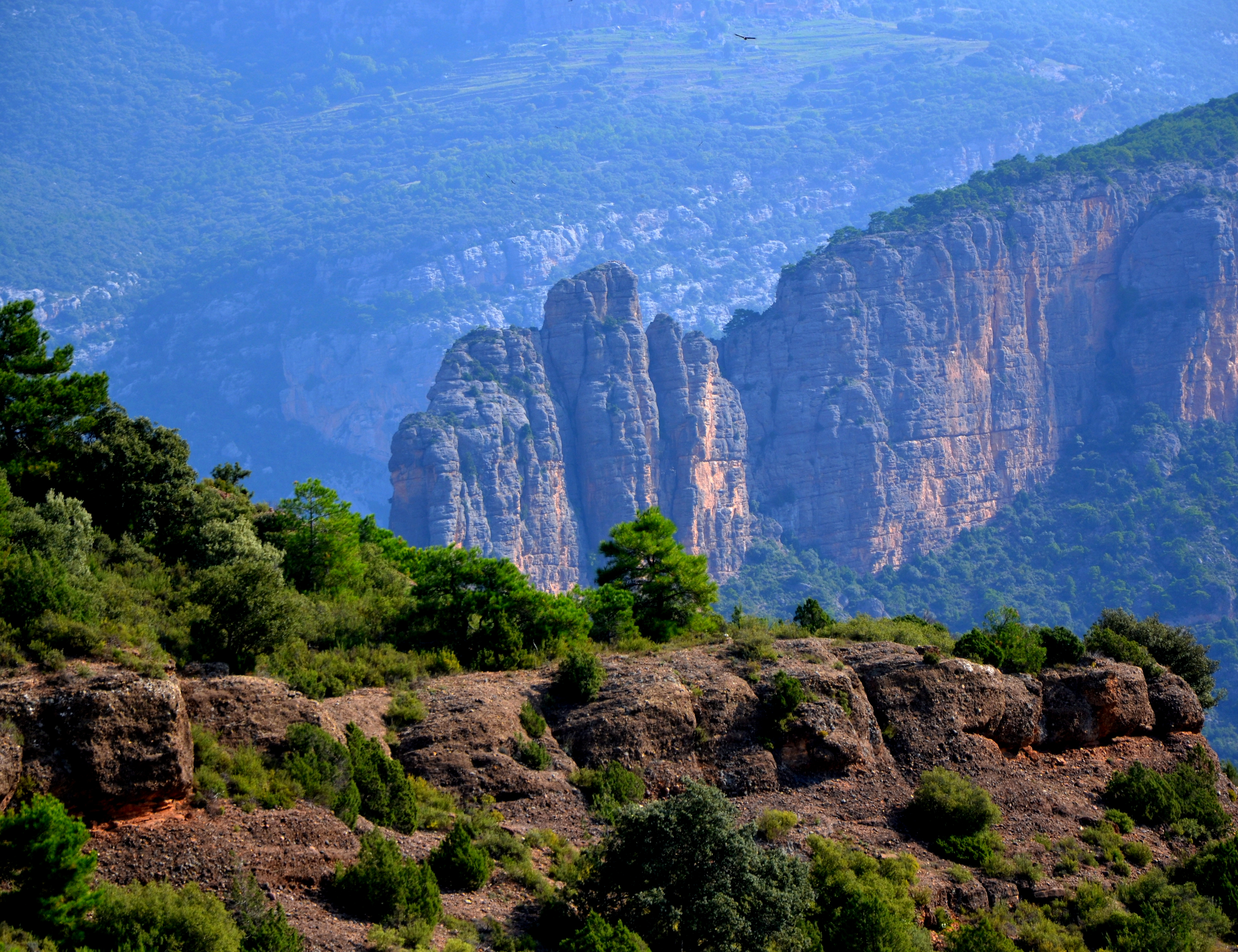 Collegats-Queralt This is a a photo of a natural area in Catalonia, Spain, with id: ES510098